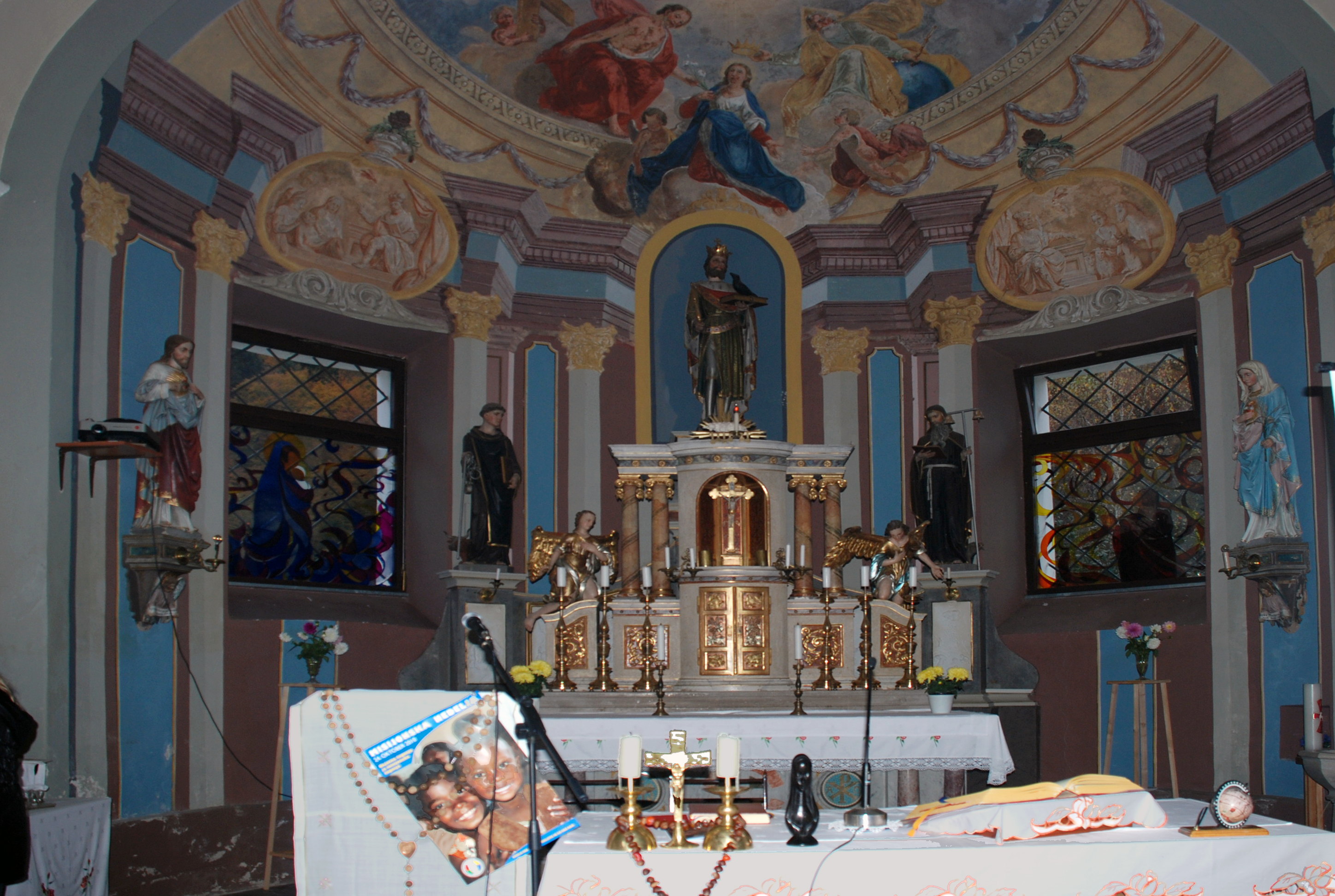 Hochaltar der Pfarrkirche von Ožbalt (St. Oswald im Drauwald, St. Oswald an der Drau) Slowenien